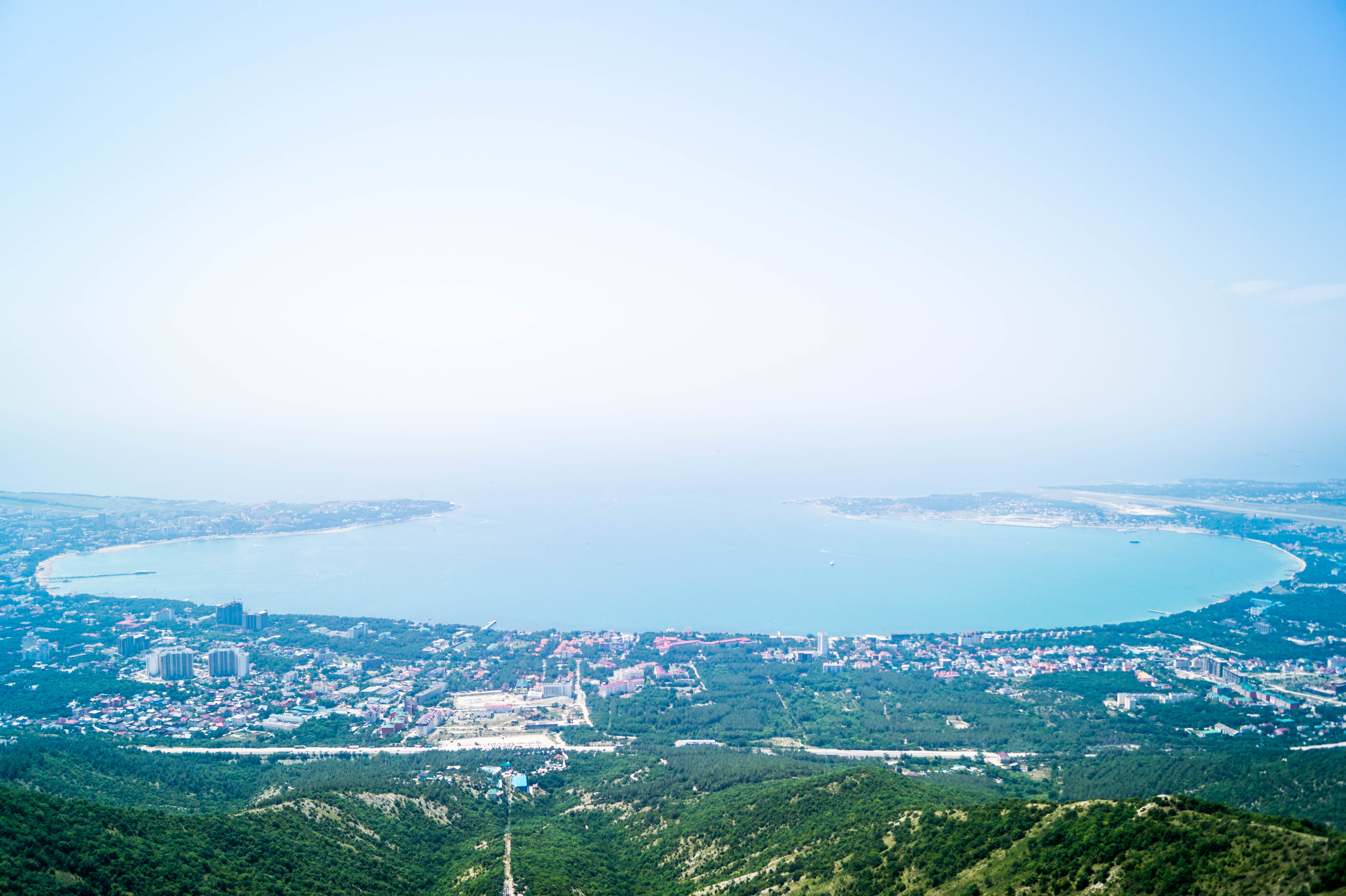 Геленджик с высоты 640 м над уровнем моря Фотограф Катерина Ровенская (Rovenskaya Katerina) Место съемки: г. Геленджик "Сафари-парк"; 640 м над уровнем моря; 2015 год.